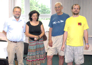 Víťazné družstvo z paralerného turnaja MSJ Pieštany